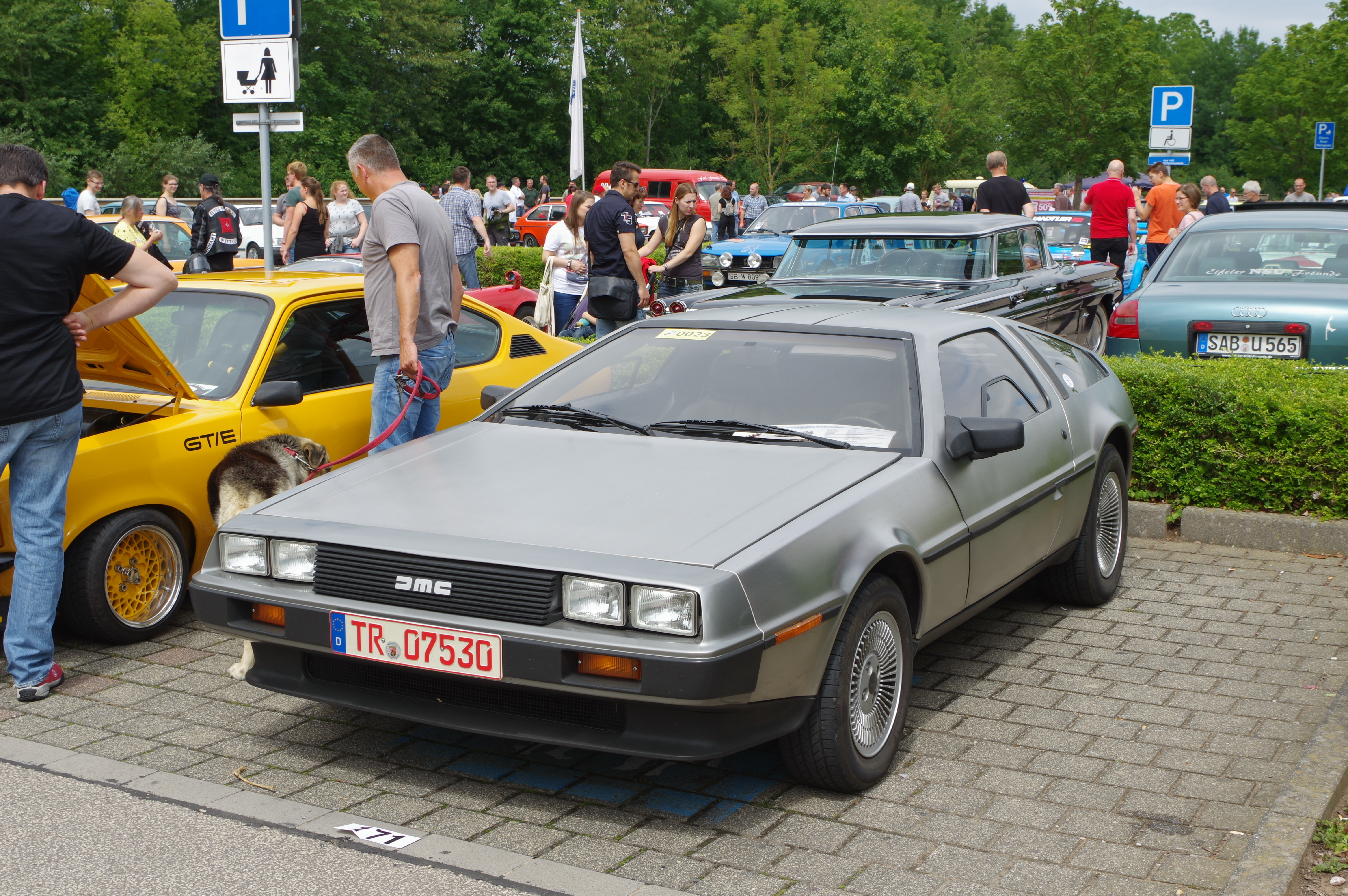 DeLorean DMC-12